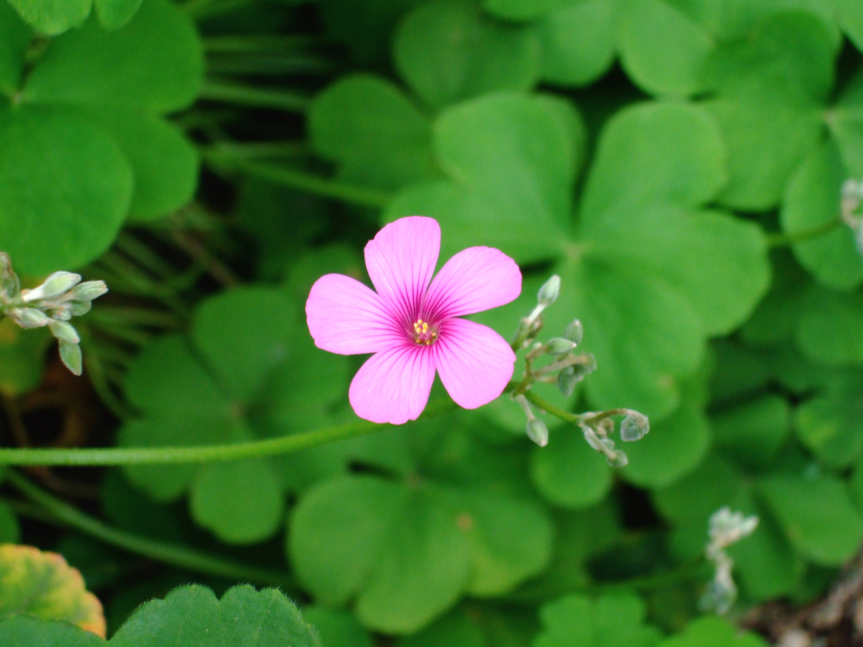 Oxalis sp.花